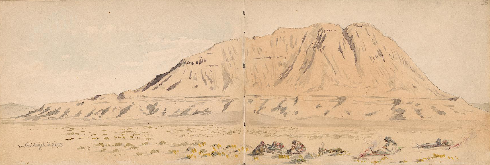 Jildiyyah Mountain